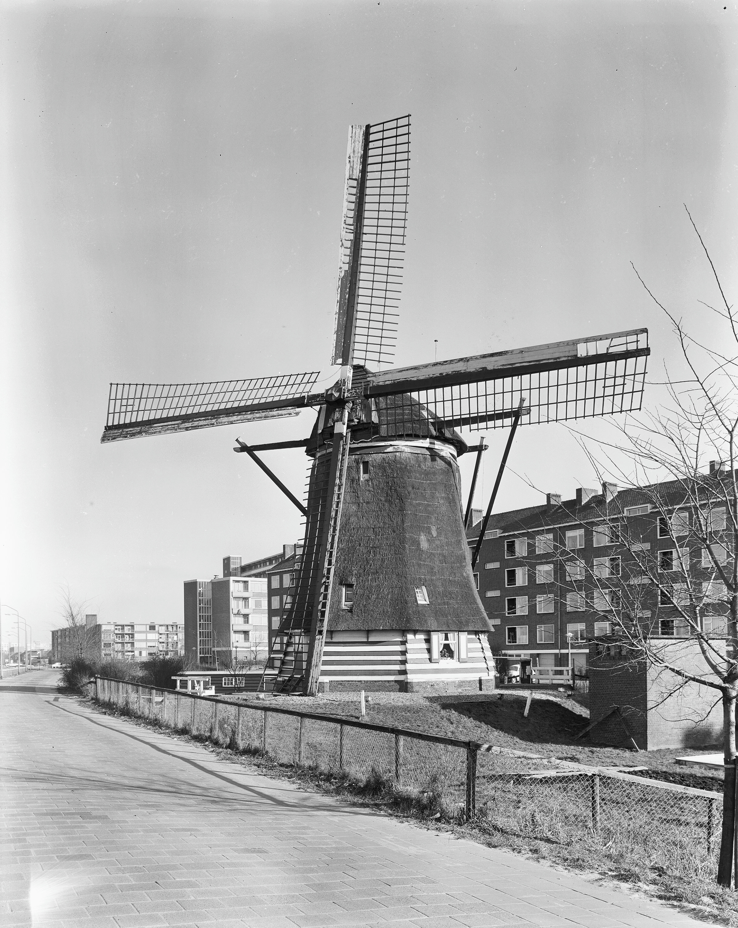 De 1200 Roe: Haarlemmerweg c-325, Poldermolen "De 1200 roe", aanzicht. Dit was vroeger de poldermolen van de Osdorper Binnenpolder.